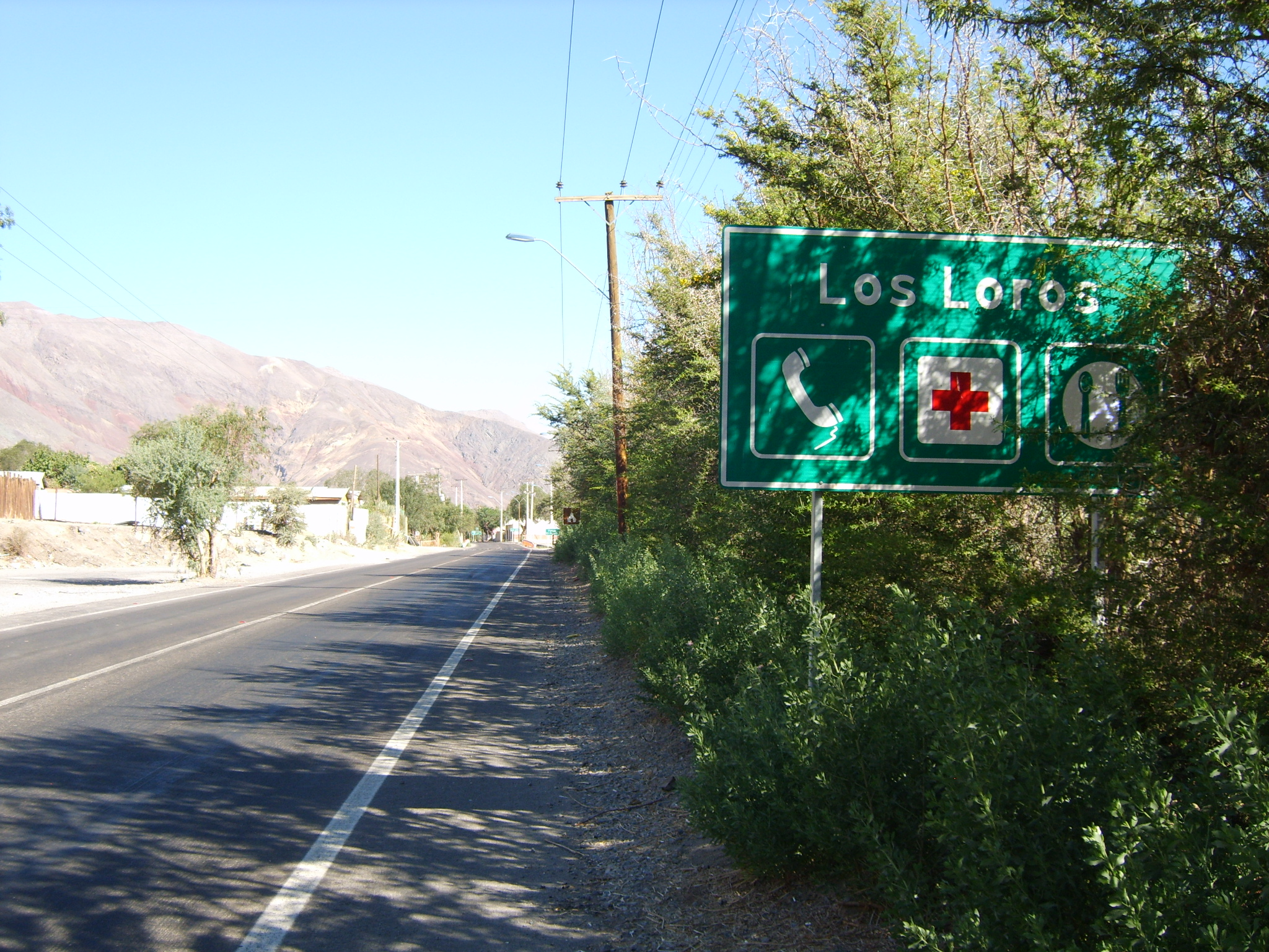 Entrada a Los Loros